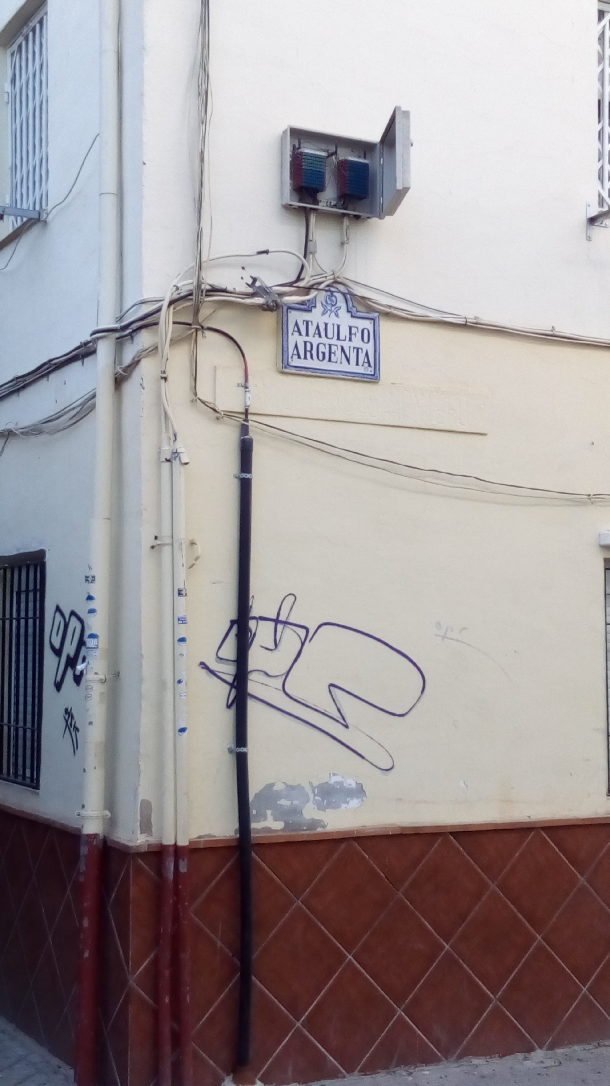 Calle de Ataulfo Argenta en el barrio de la Chana de Granada.